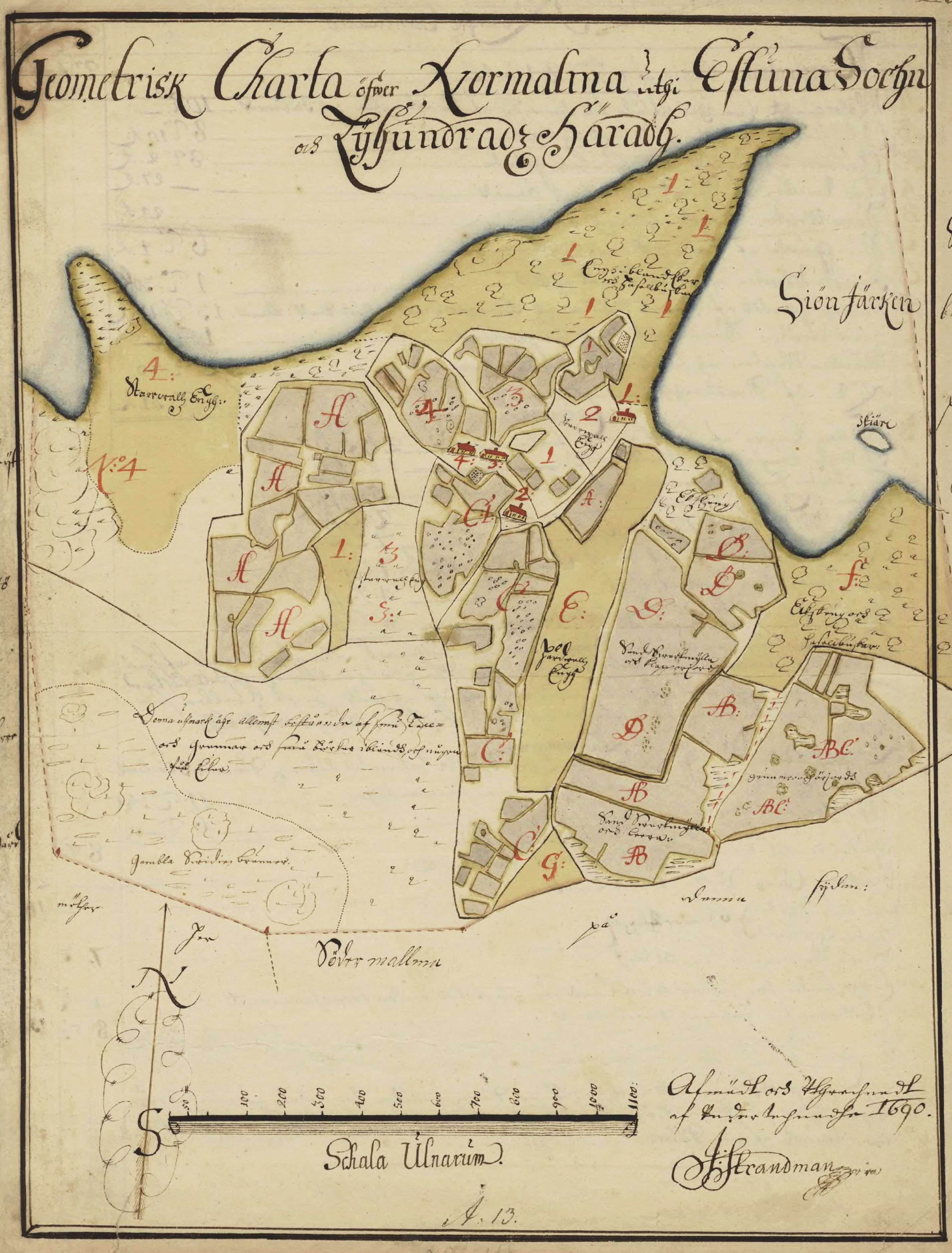 Karta över Norra Malma